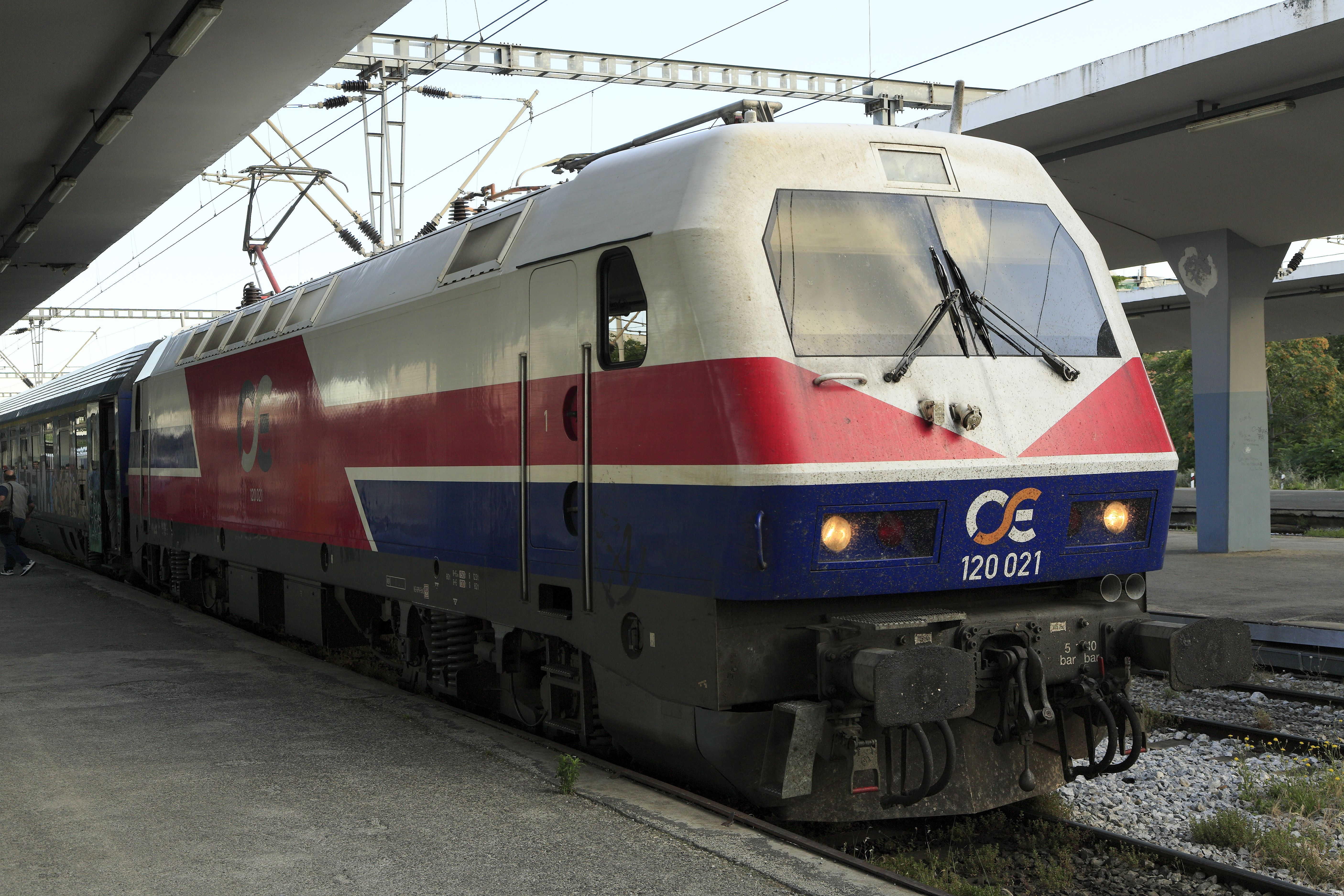 Mit dem Nachtzug 600 von Athen eingefahren, allerdings mit über einer Stunde Verspätung. Auf den zweiten Blick fällt am angelegten Stromabnehmer das fehlende Endhorn in Fahrtrichtung rechts auf. Mit etwas Pech hätte diese Palette auch das Kettenwerk abräumen können. Der Lokführer scheint es nicht bemerkt zu haben, er fährt mit dieser angeschlagenen Palette ins Bw.